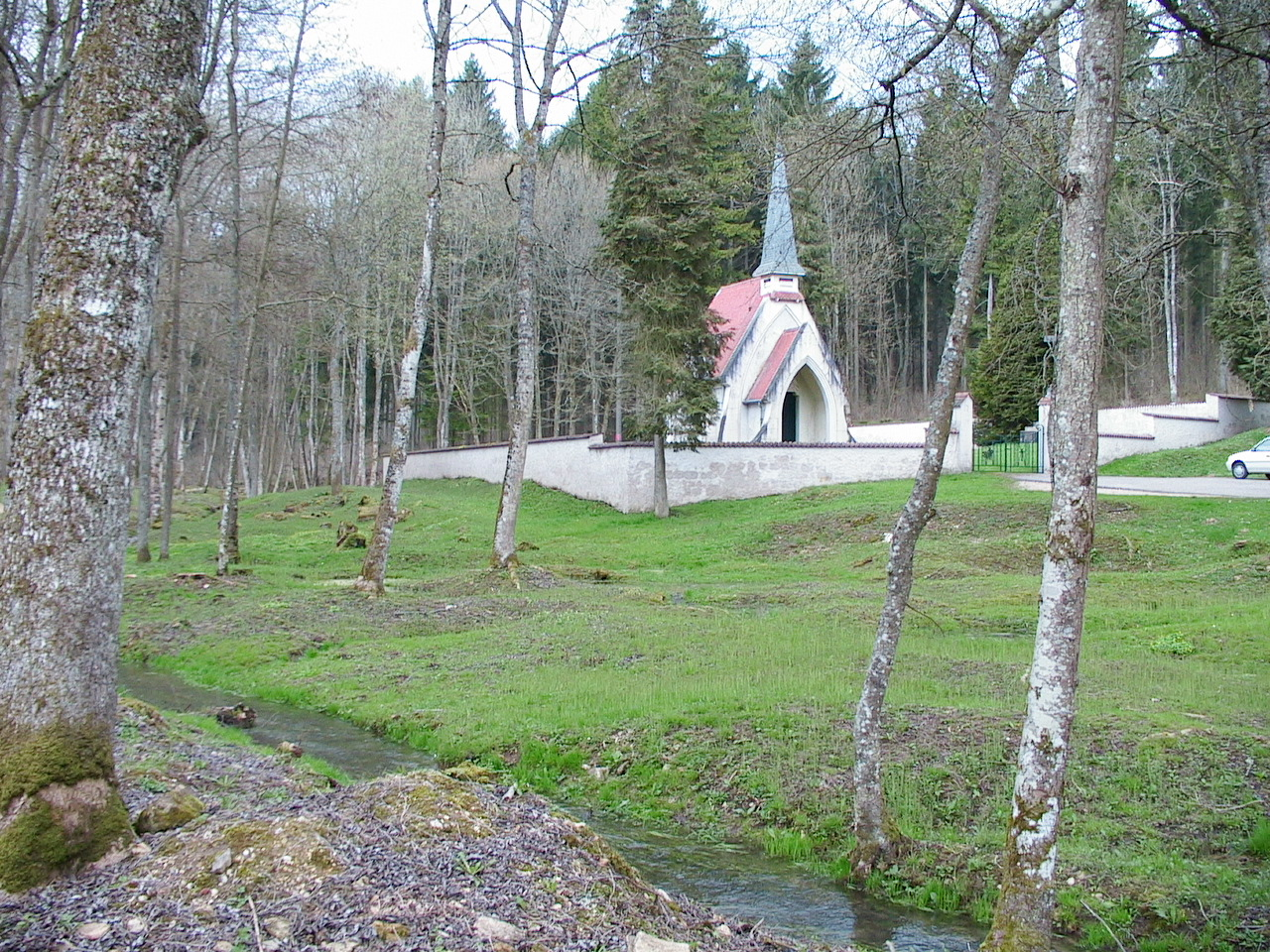 Bezonvaux (55), dans le village détruit : le ruisseau et la chapelle de 1932 Photo prise par F5ZV le 17/04/2006